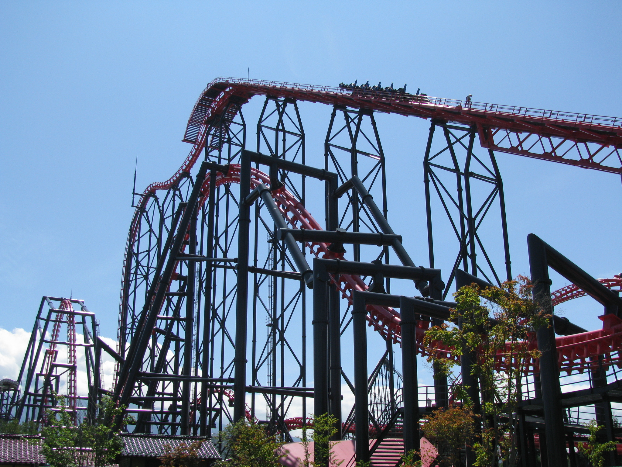 Roller coaster Eejanaika in Fujikyu Highland.